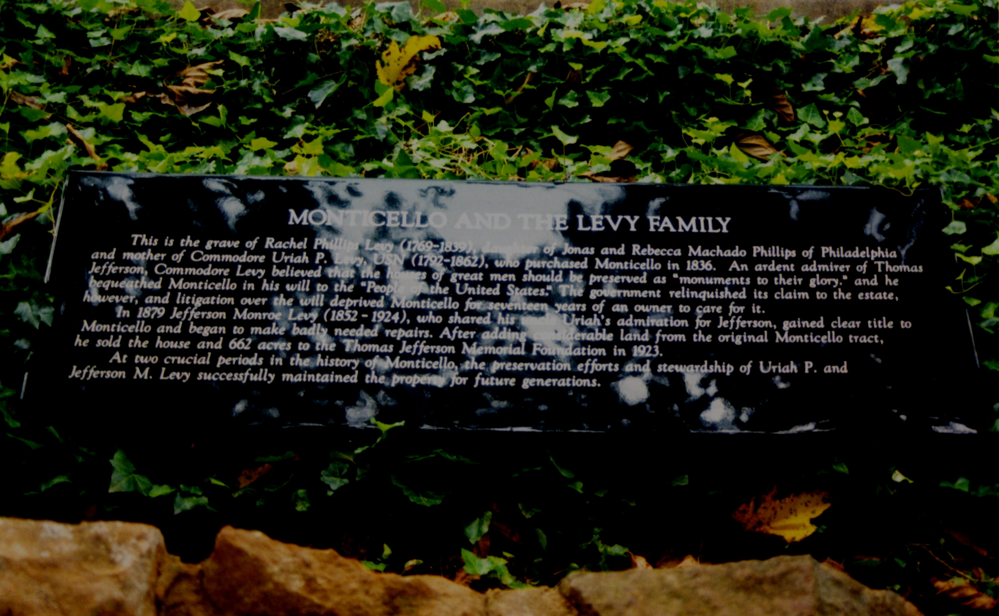 Plaque commémorative sur la tombe de Rachel Phillips Levy à Monticello